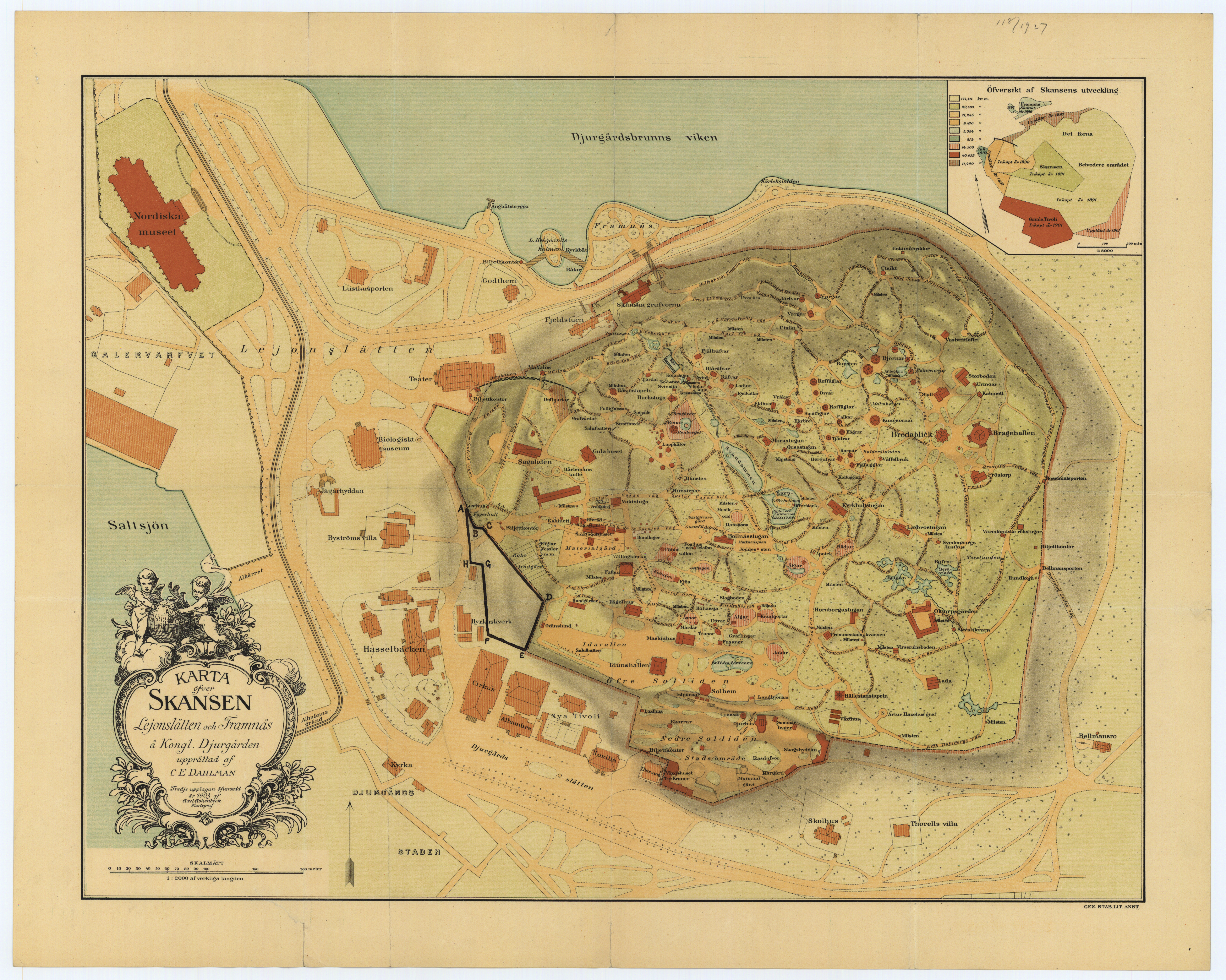 Lantmätare Carl Edvard Dahlman